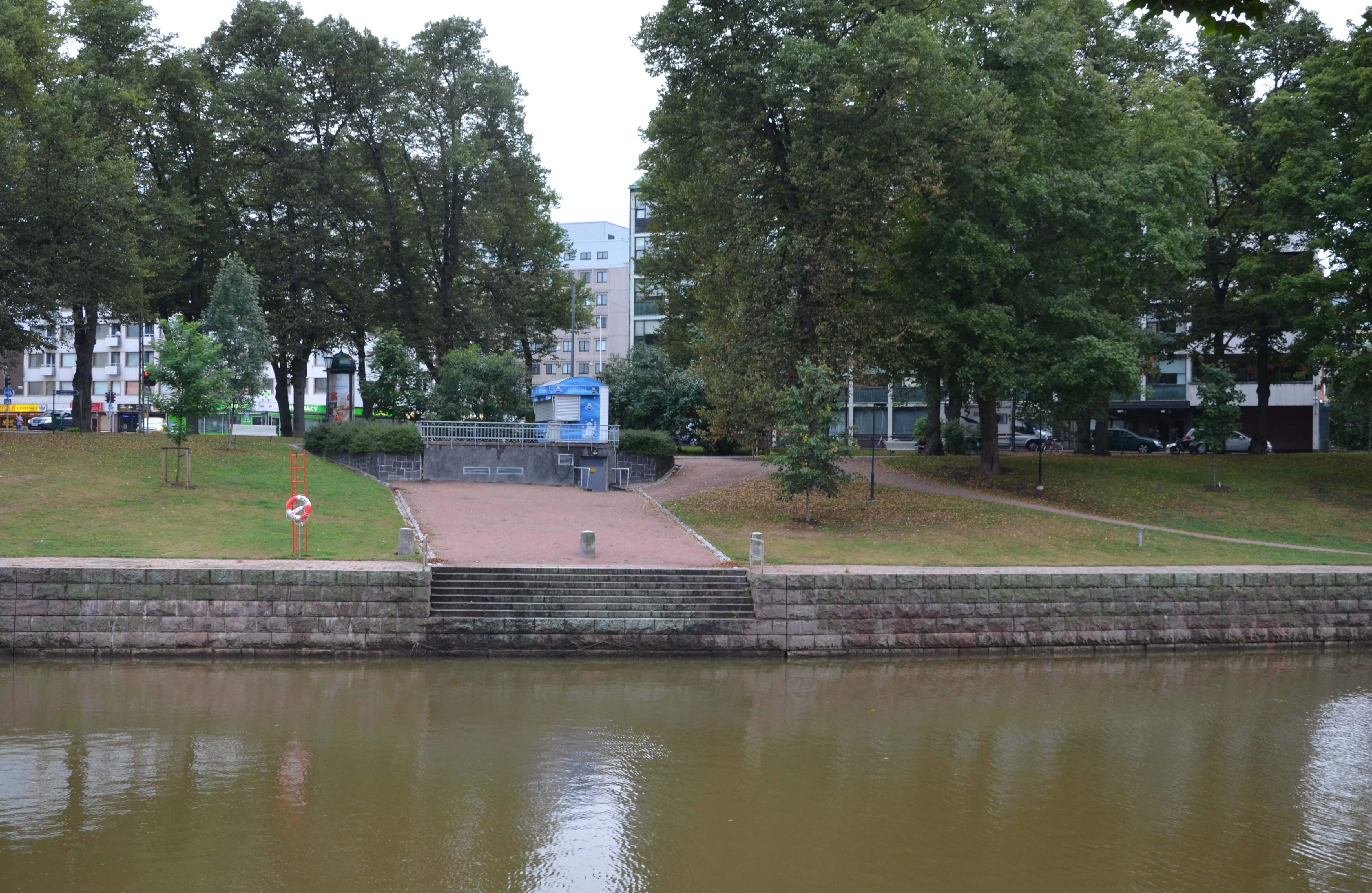 Turussa sijaitseva Lönnrotinpuisto vastarannalta kuvattuna. Kuvan keskellä sähkömuuntajakoppi jonka päällä on jäätelökioski.